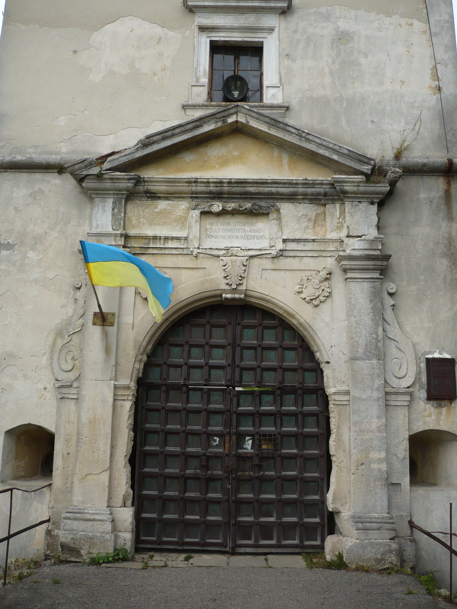 Bramka zamku w Świrzu na Ukrainie. Zamek stanowił pierwotnie własność książąt Świrskich, od XVII wieku należał do rodu Cetnerów, zniszczony podczas wojen kozackich w 1648, zdobyty przez Turków w 1672. Po pierwszym rozbiorze Rzeczypospolitej znalazł się na obszarze zaboru austriackiego. Ostatnimi właścicielami przed 1939 byli Irena z Lamezanów i jej mąż Tadeusz Komorowski, późniejszy dowódca Armii Krajowej i powstania warszawskiego